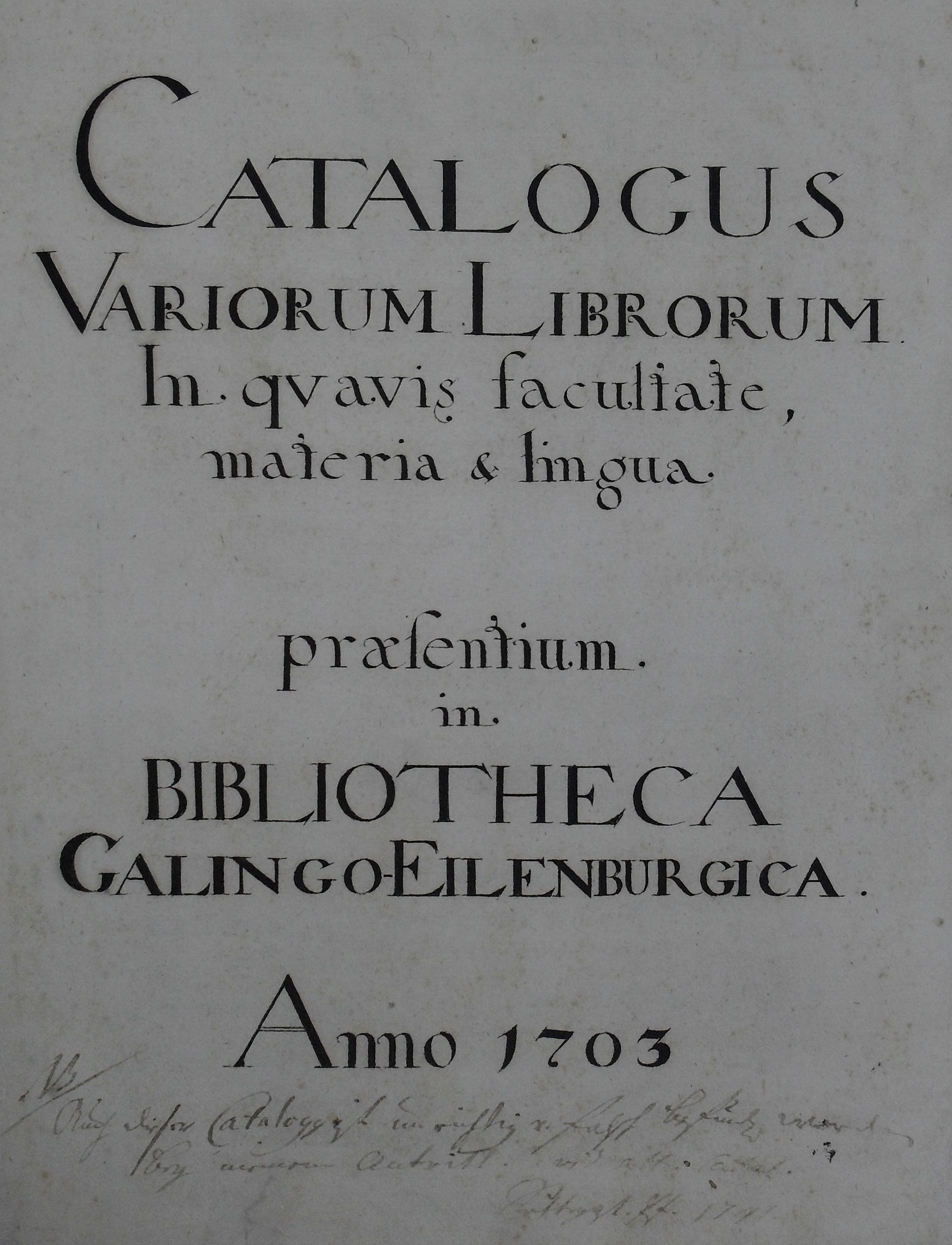 Karta tytułowa katalogu biblioteki rodziny Eulenburg z 1703 roku. Na dole odręczne zapiski proboszcza kościoła w Galinach Johanna Daniela Settegast. Obecnie w zbiorach Biblioteki Uniwersyteckiej w Toruniu, sygn. Rps. 541/III